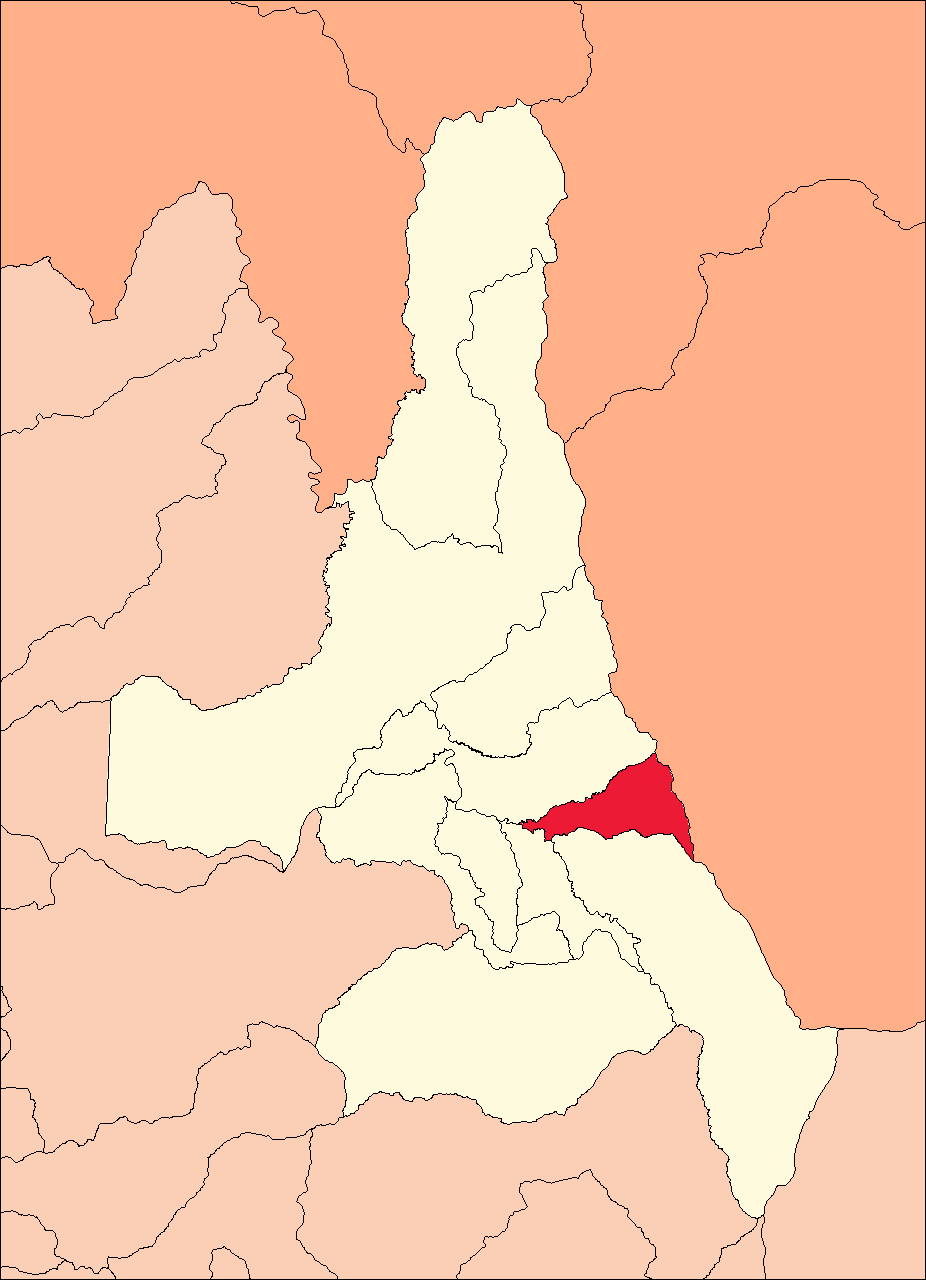 Área del distrito de Hermilio Valdizán.